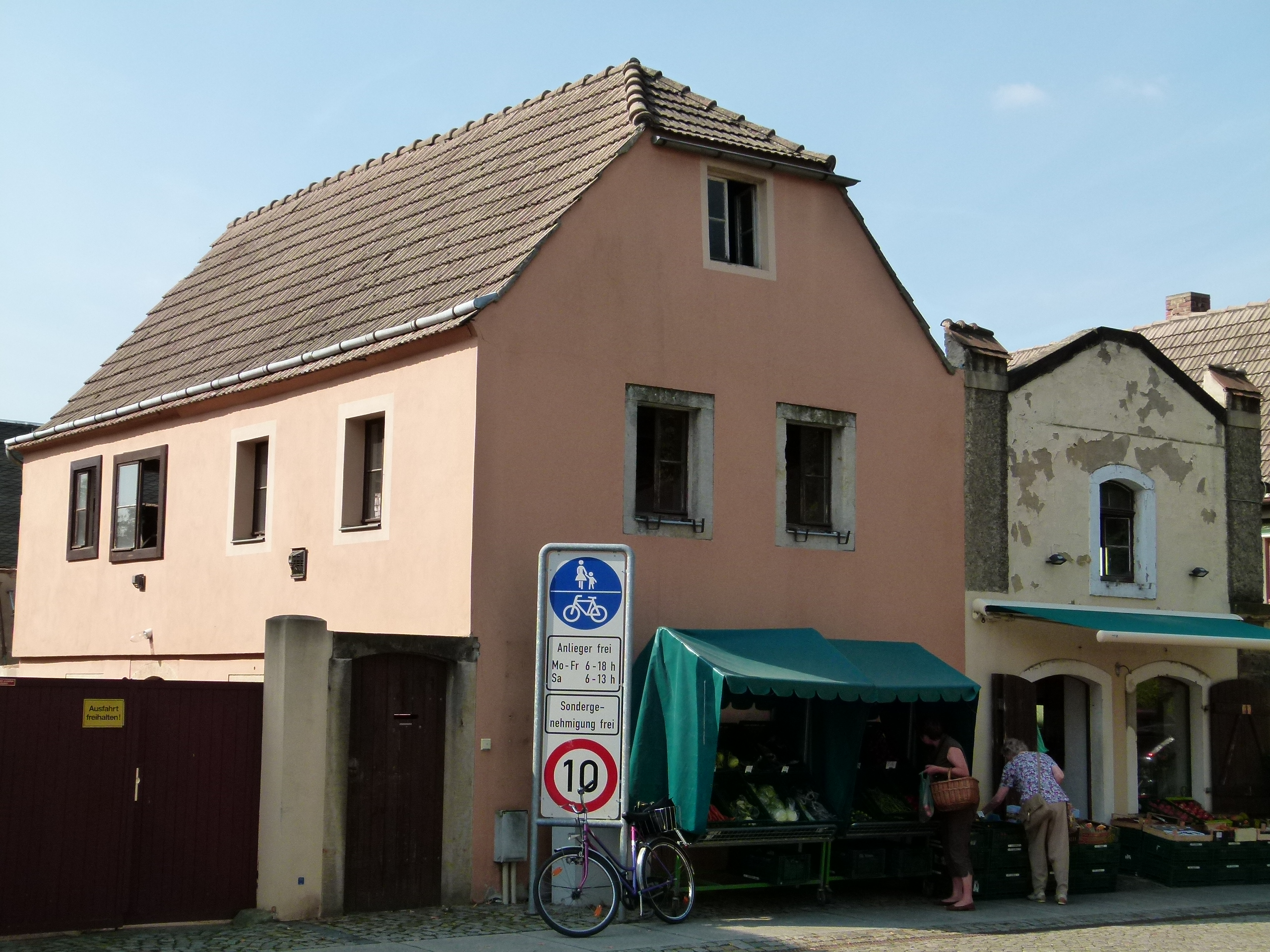 Denkmalgeschütztes Haus, Altkötzschenbroda 44, Radebeul, Sachsen